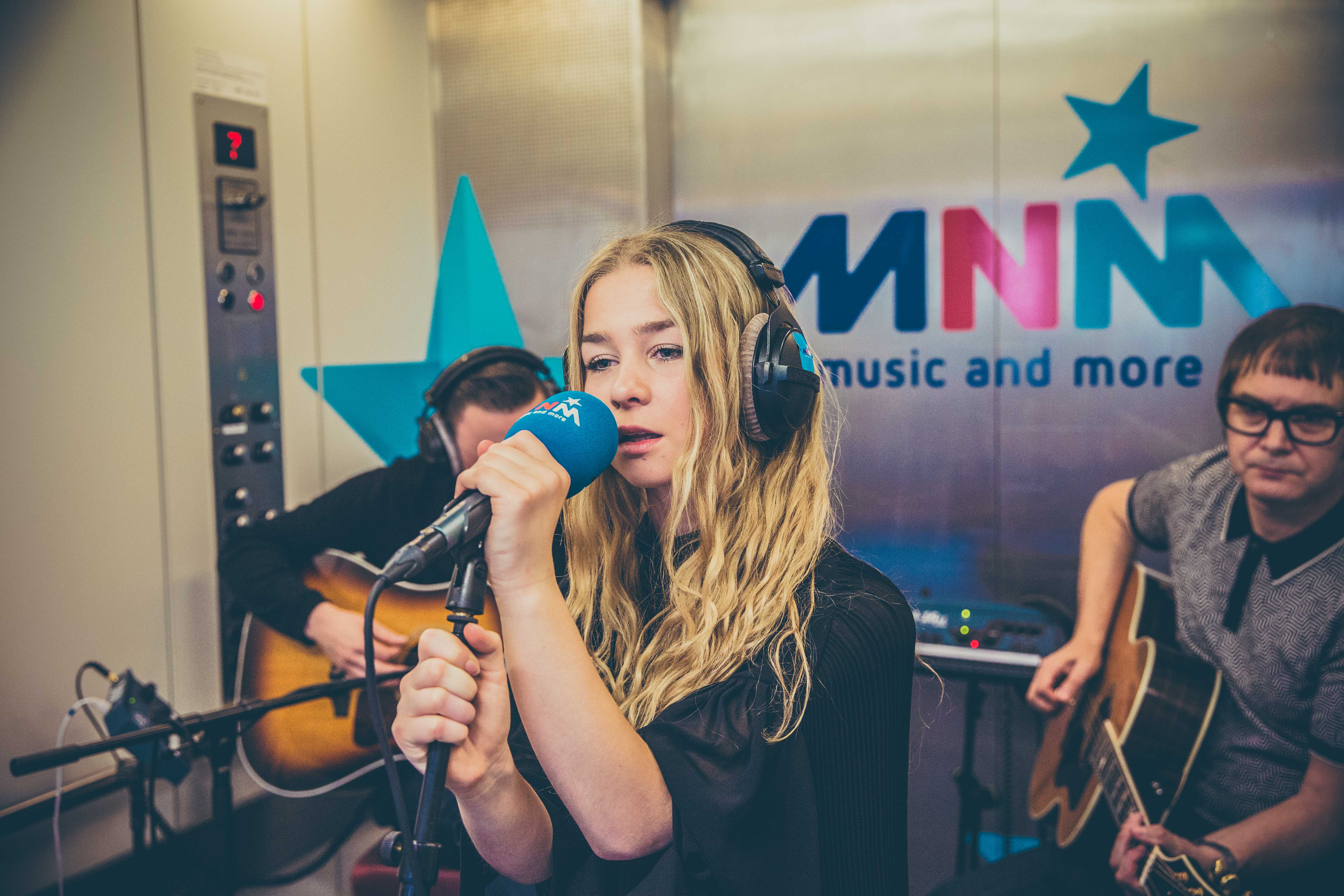 Hooverphonic tijdens een liftconcert bij MNM